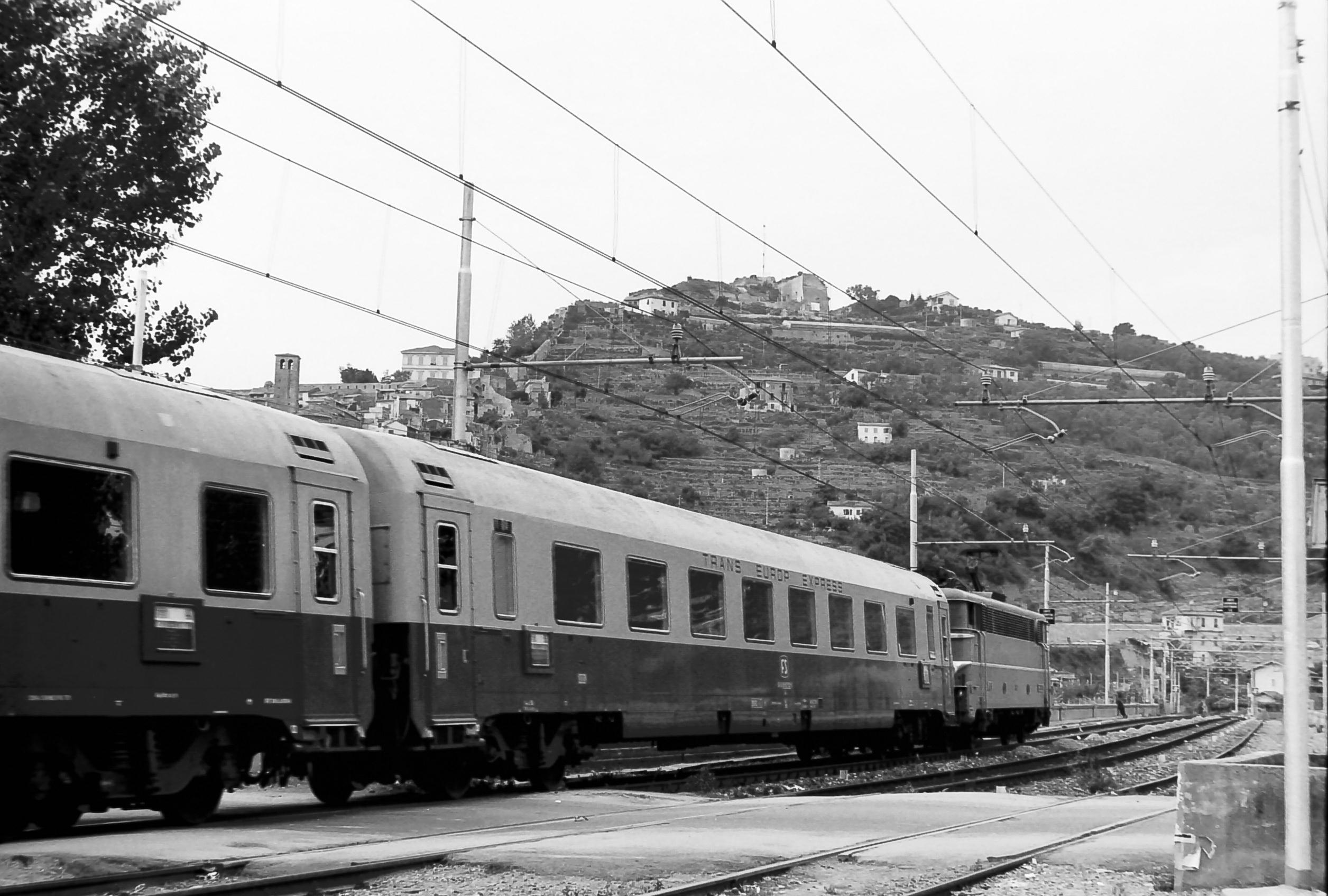 Il treno TEE "Ligure" Milano-Avignone appena partito da Ventimiglia. In testa due carrozze tipo Az a compartimenti.